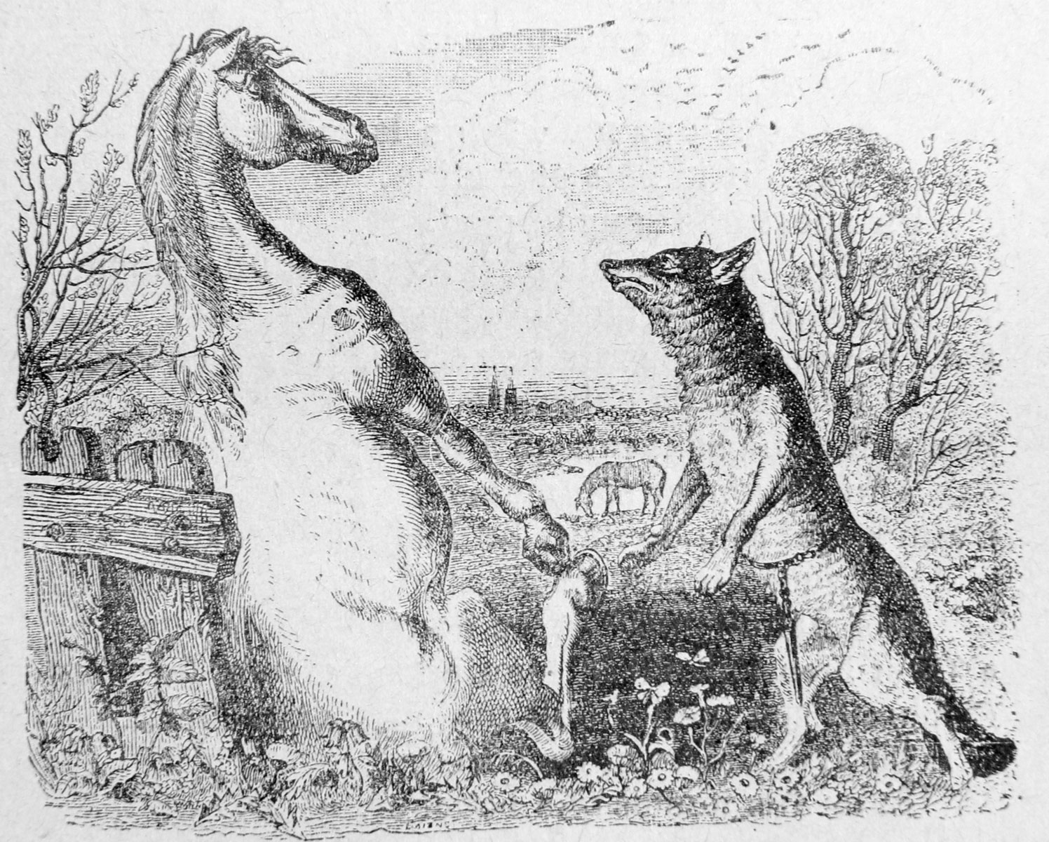 J.J. Grandville. Illustrations des Fables de La Fontaine. 1838-1840.